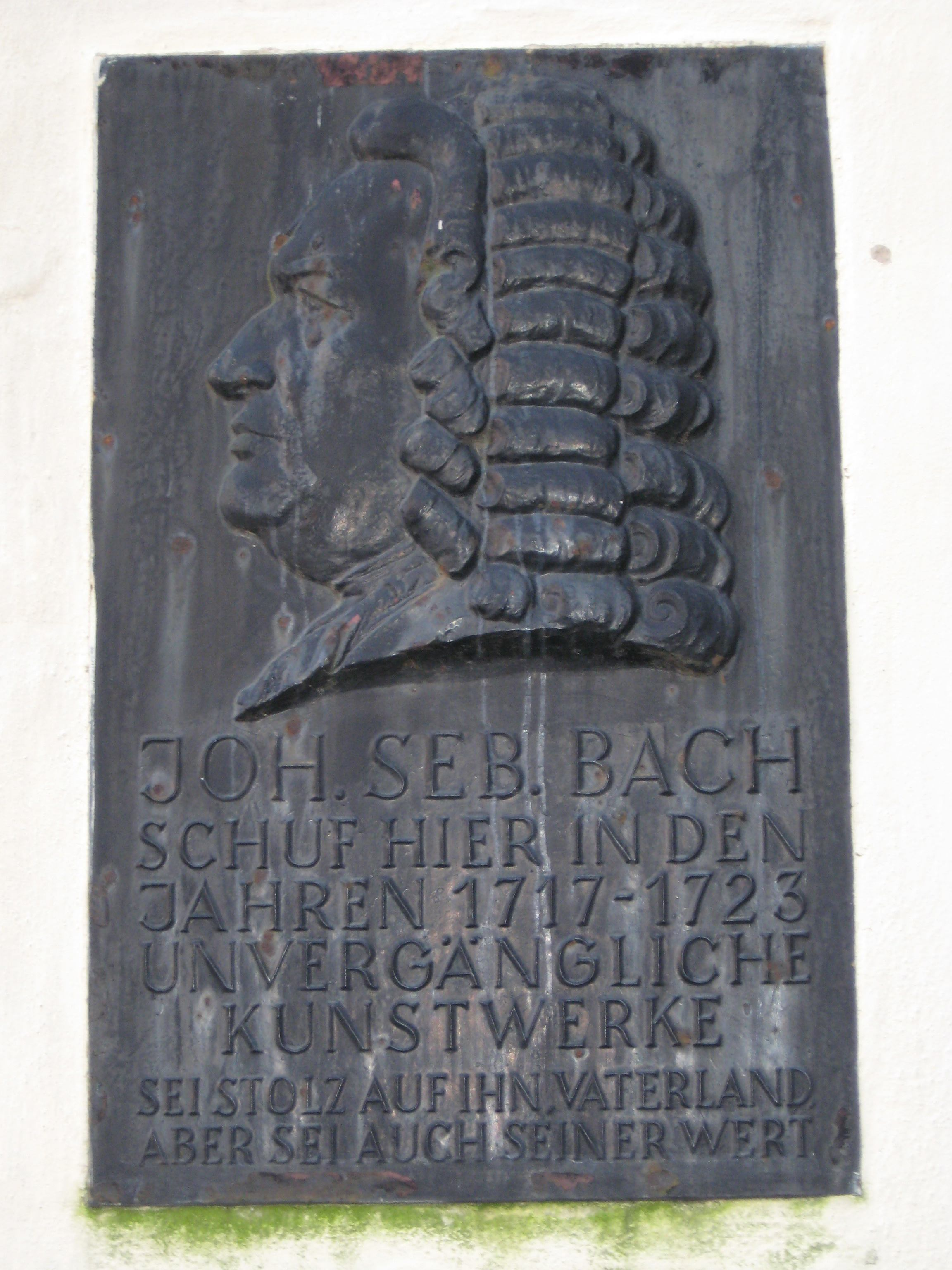 Tafel zur Erinnerung an das Wirken von Johann Sebastian Bach in Köthen. Inschrift: „Joh. Seb. Bach schuf hier in den Jahren 1717-1723 unvergängliche Kunstwerke Seit Stolz auf ihn Vaterland Aber sei auch seiner wert.“— in: Die Tafel selbst